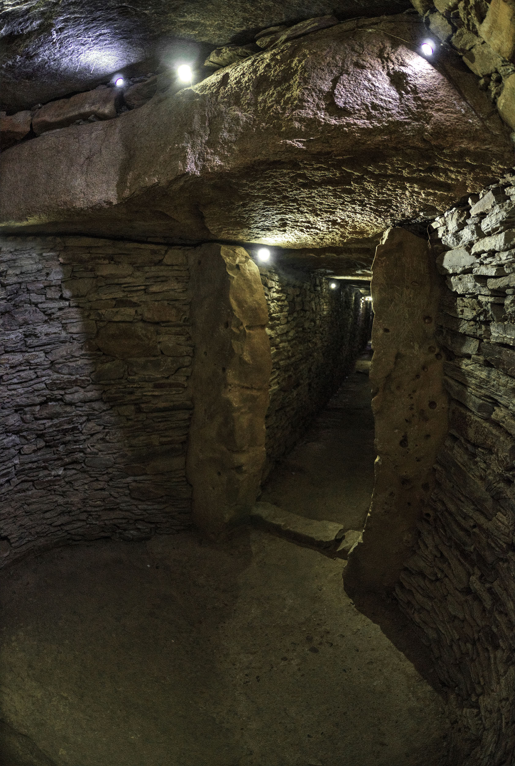 El tholos de La Pastora fue descubierto en 1860 durante unas labores agrícolas. Es una construcción con muros de pizarra cerrados por grandes losas de granito y caliza. El corredor mide 42 m con lo que se convierte en el mayor longitud de la Península Ibérica. La cámara final es de unos 2.5 m de diámetro y 3 m de altura. Está construida en falsa cúpula y cerrada por una gran losa. En un lugar del muro hay una hornacina. Aparte de sus características extraordinarias, es única la orientación del corredor hacia el Suroeste (243º). Ver este documento para mejor y más completa información.